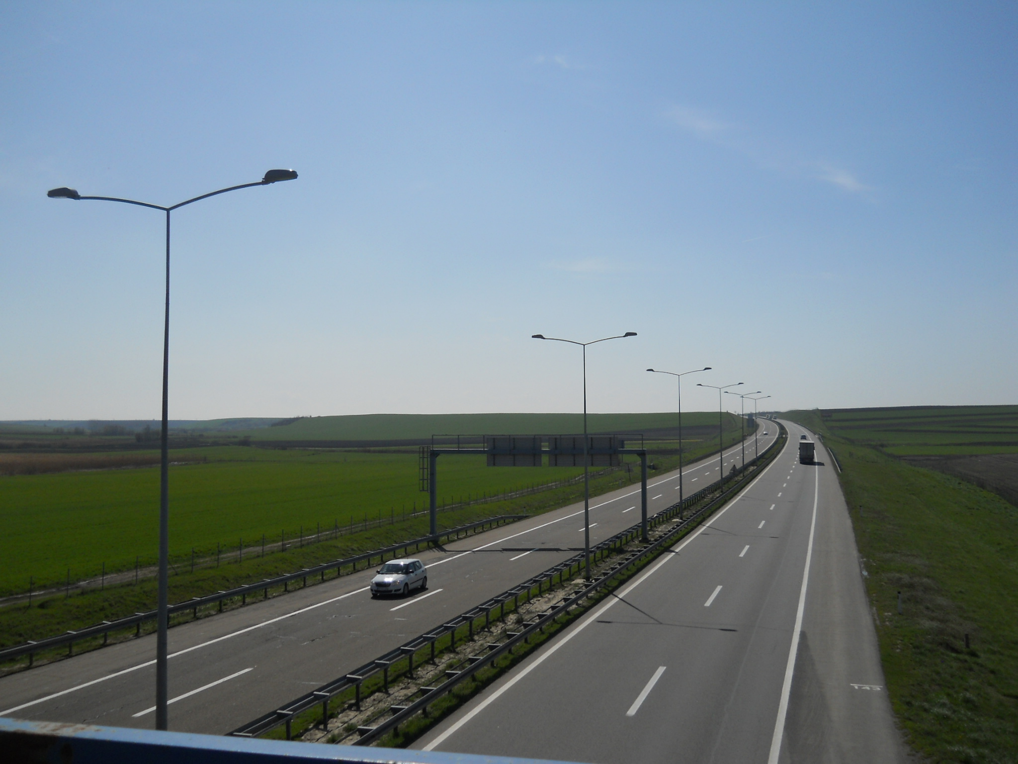 Beška - az A1-es autópálya a falutól keletre